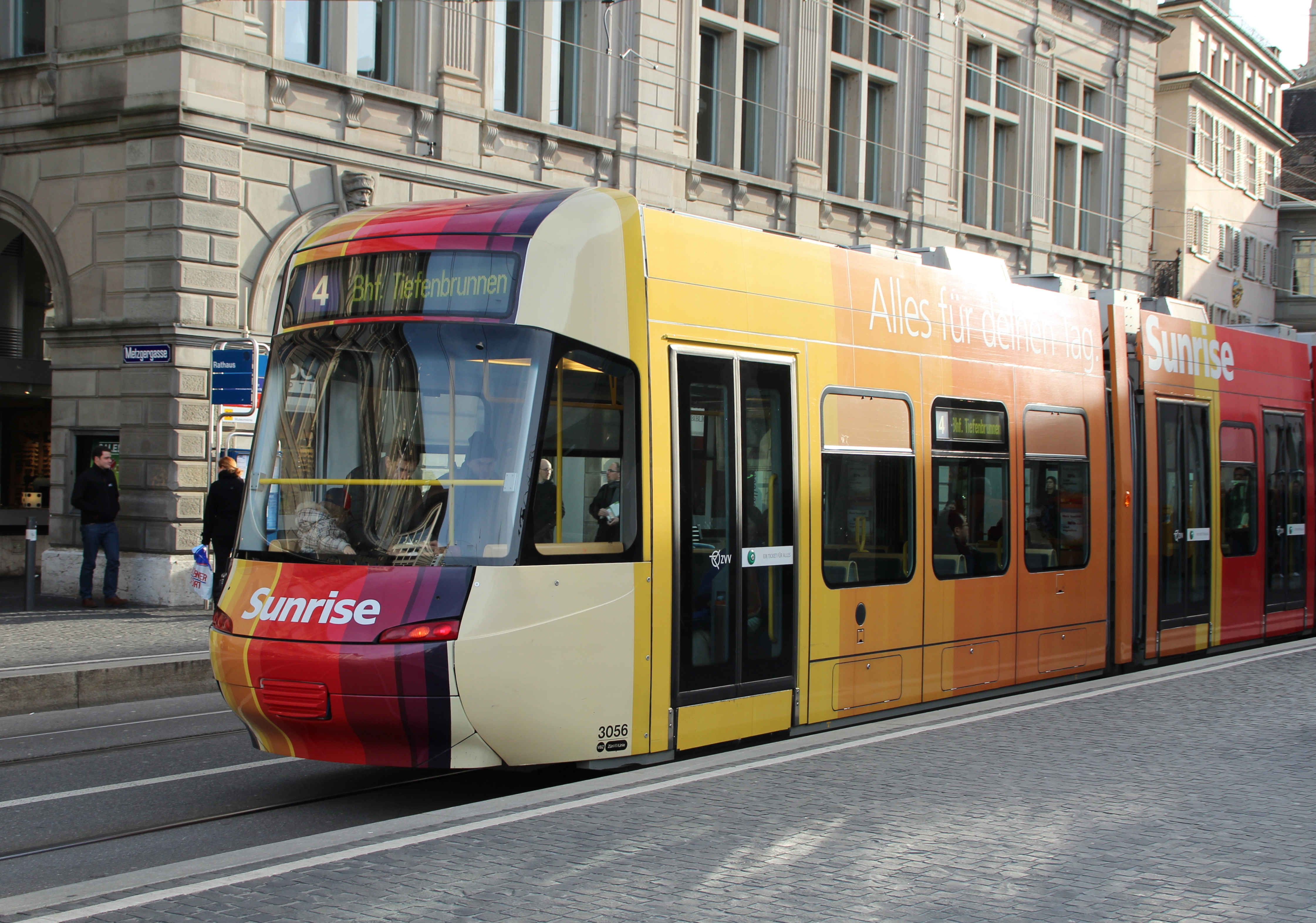 Sunrise-Tram am Limmatquai